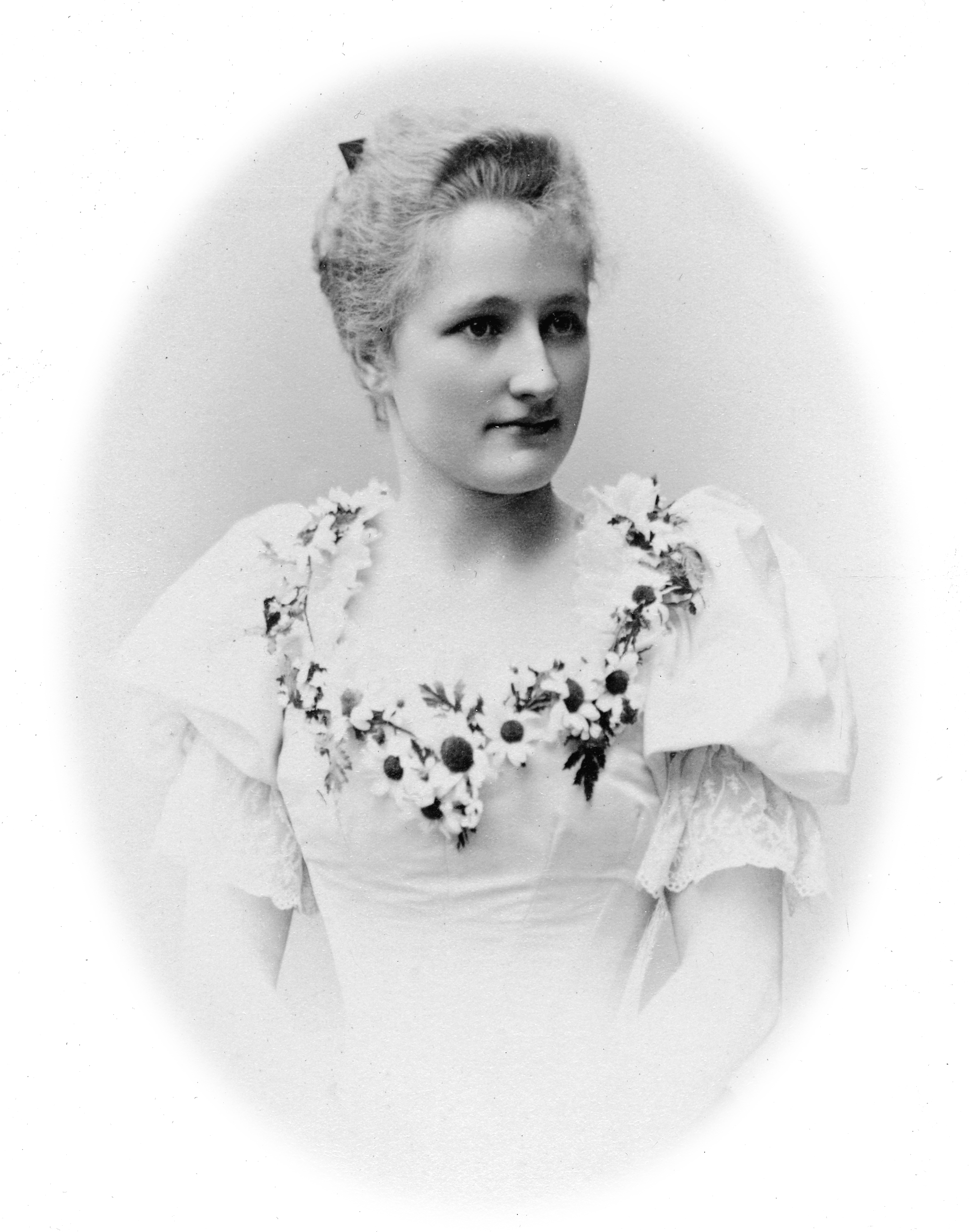 Jenny Brandt, dansare vid Kungliga Operan 1893